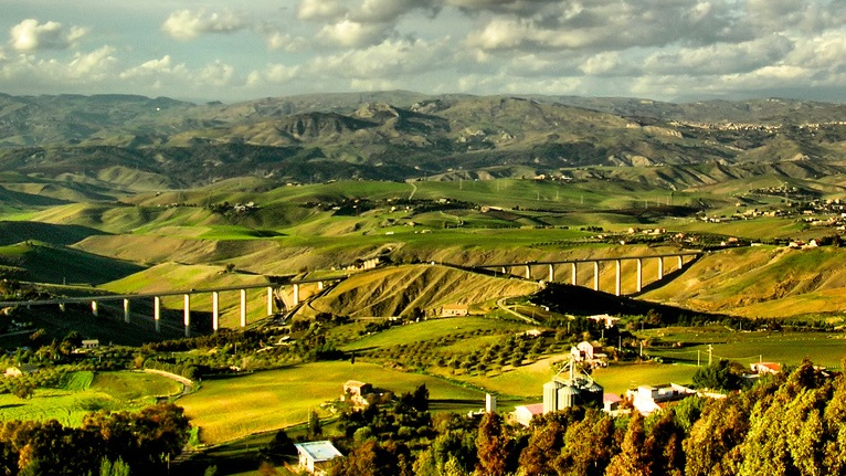 Dettaglio della vista del vallone di Caltanissetta. Sono visibili i viadotti San Giuliano e La Spia della strada statale 640 di Porto Empedocle